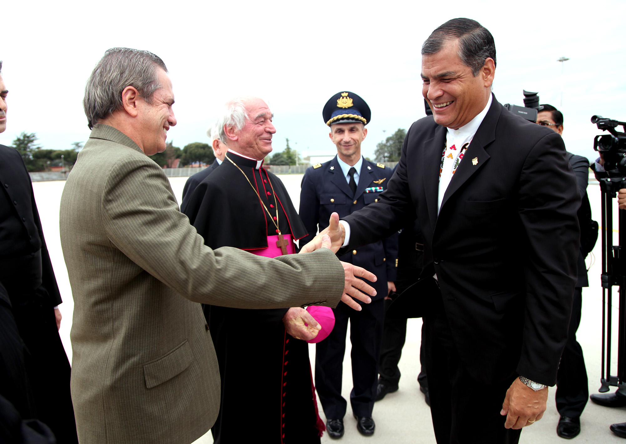 Roma (Italia), 27 de abril de 2015. El Canciller Ricardo Patiño recibió al Presidente Rafael Correa en el aeropuerto de Roma, quienes cumpliran una visita Vaticano. Foto: Luis Astudillo C. / Cancillería